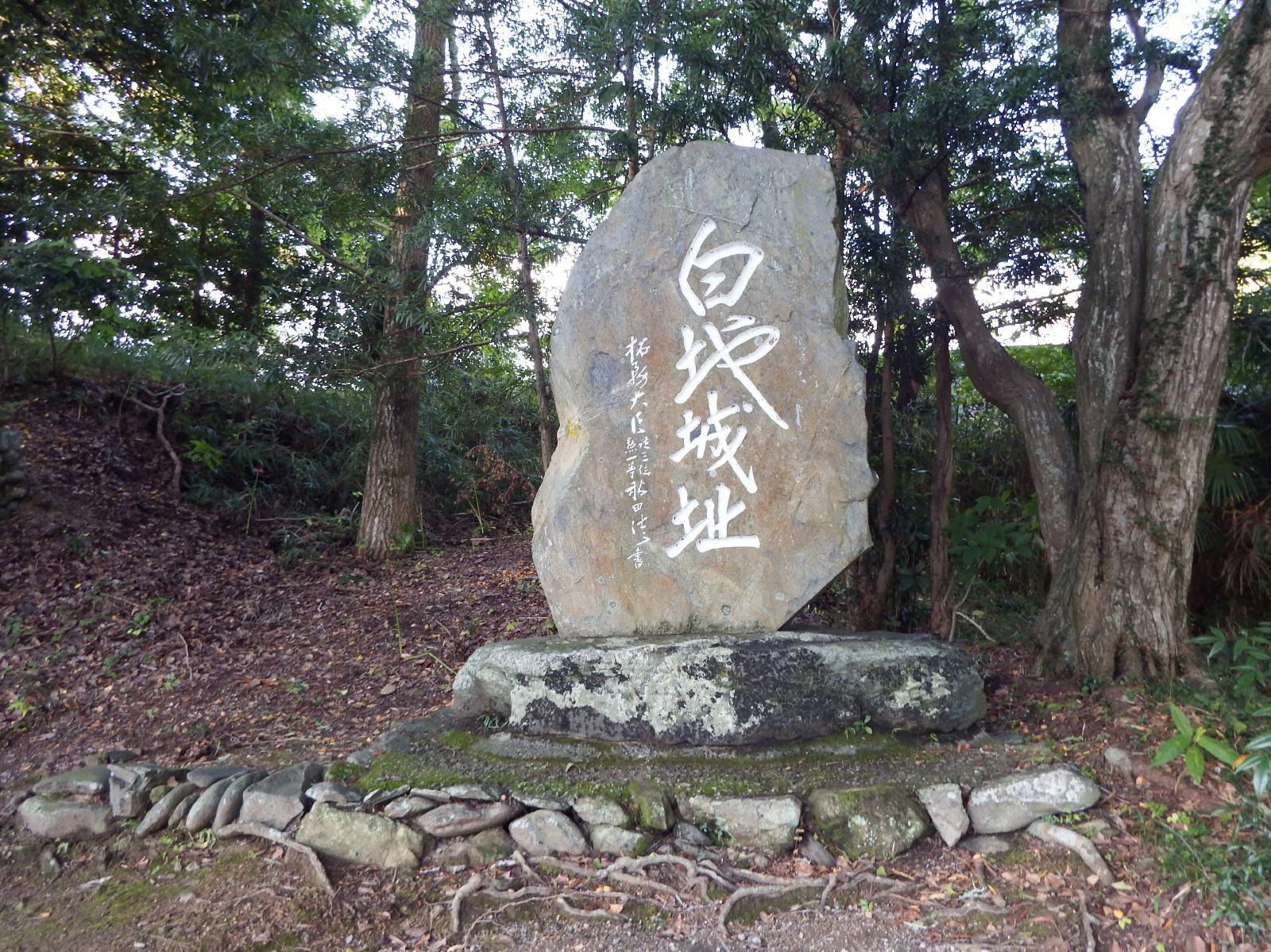 白地城跡の石碑